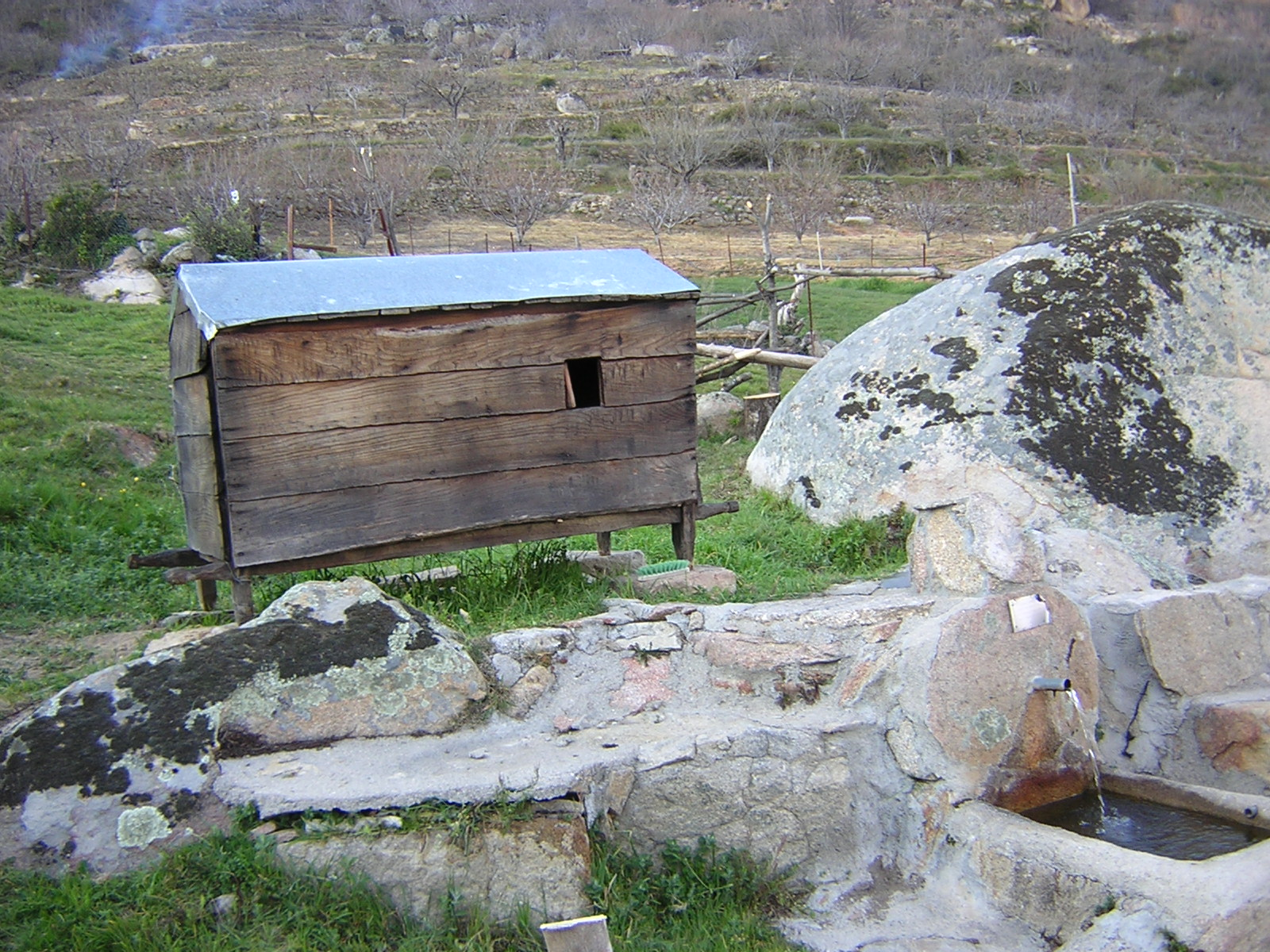 Chozo móvil de pastor. El Torno. Cáceres